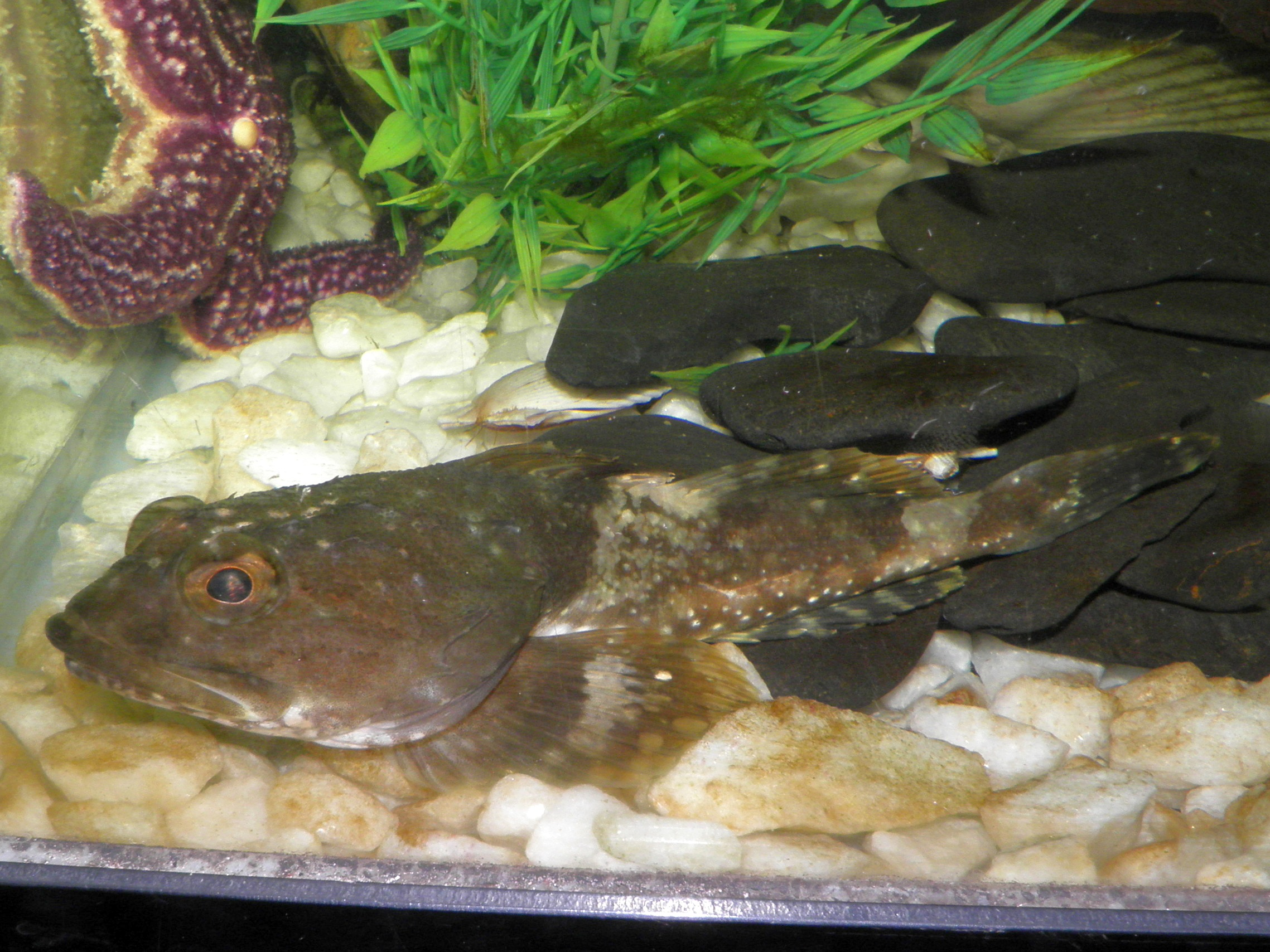 Серебристый бычок (Argyrocottus zanderi) в океанариуме Владивостока